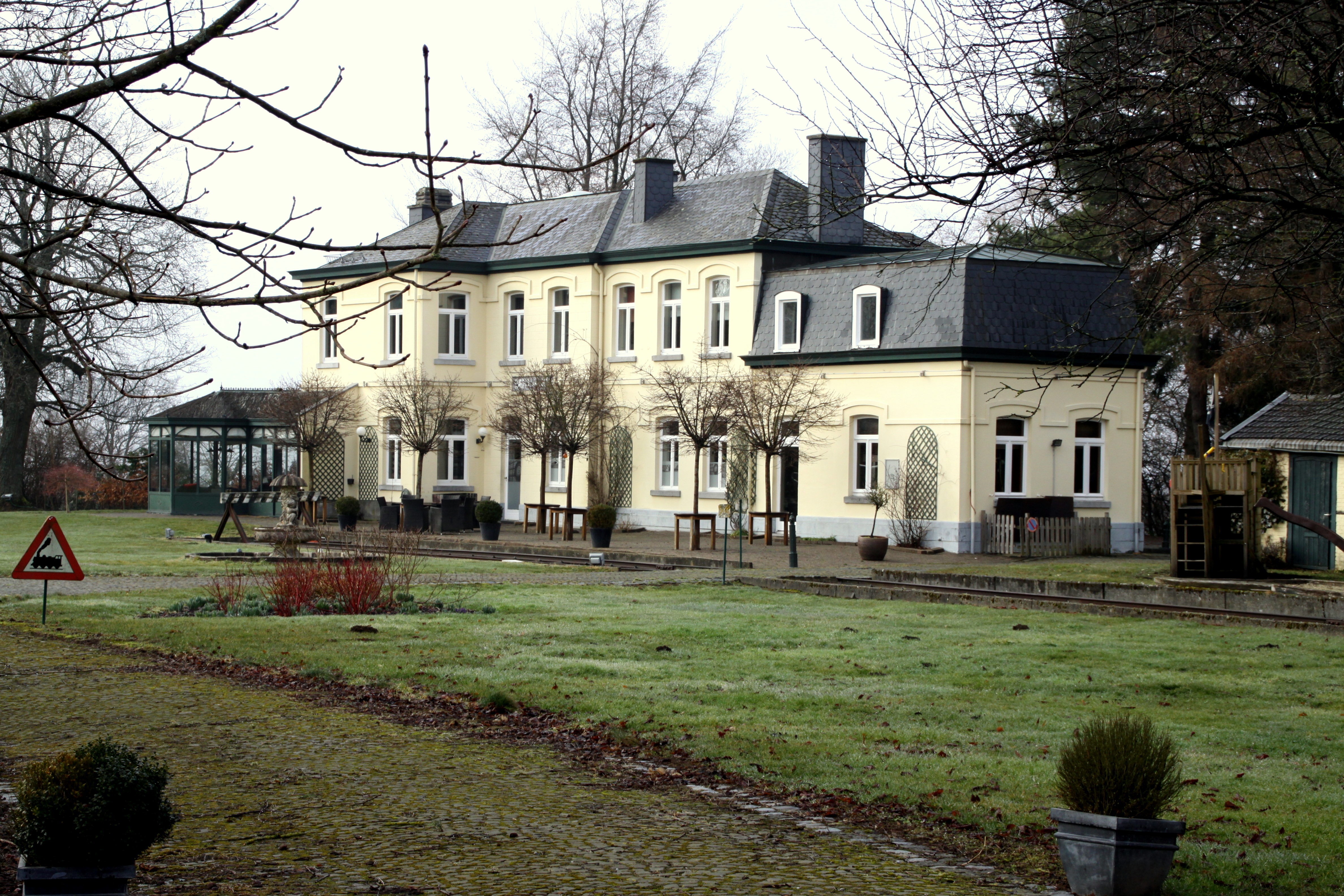 D'Gare vu Sart op der Eisebunnsstreck Lëtzebuerg-Spa